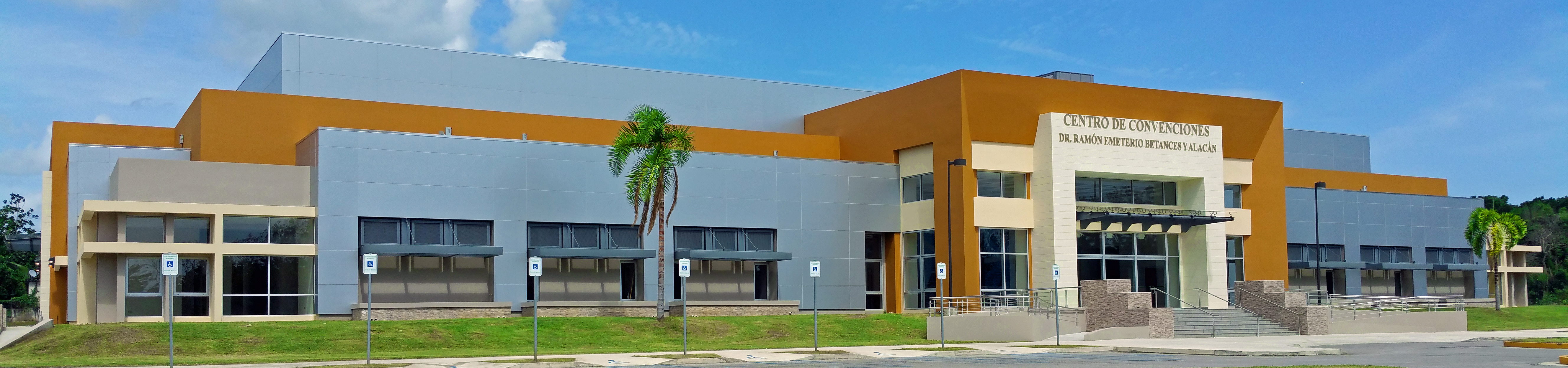 Centro de Convenciones Dr. Ramón Emeterio Betances y Alacán de Cabo Rojo.